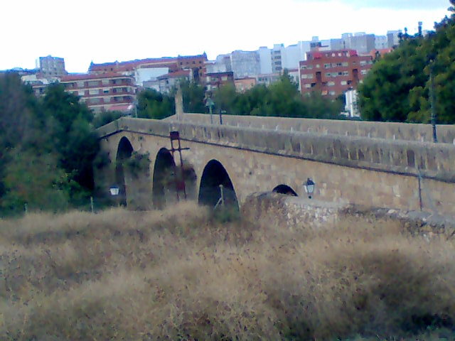 Puente sobre el río Jerte (Plasencia)